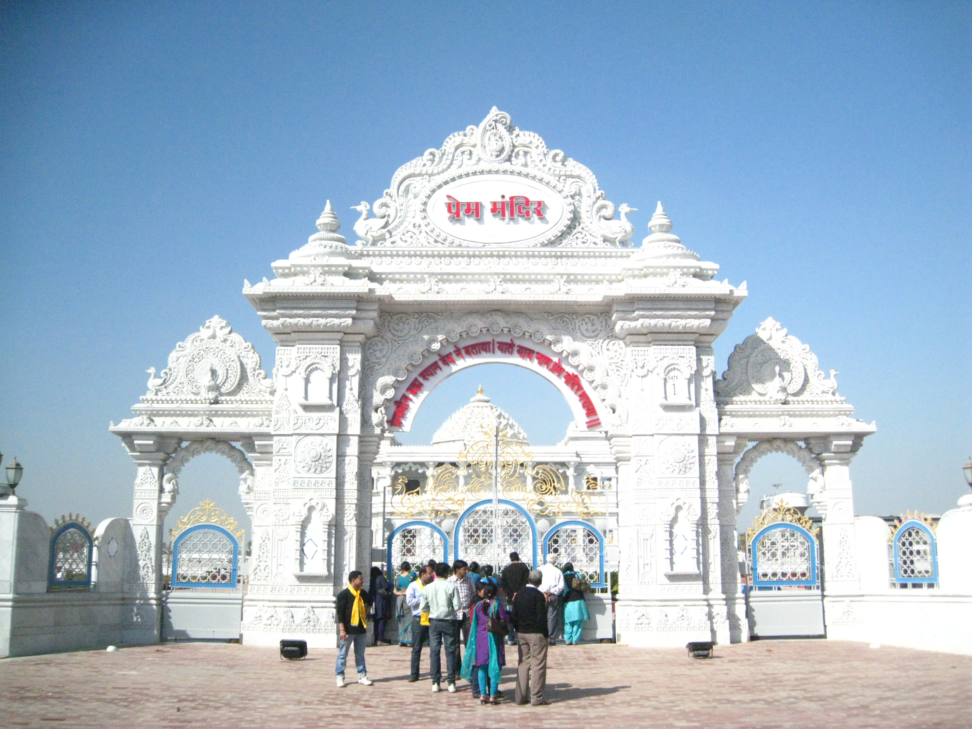 Main gate of Prem Mandir, Vrindavan, Mathura, Uttar Pradesh Built by Jagadguru Kripalu ji Maharaj/ Jagadguru Kripalu Parishat